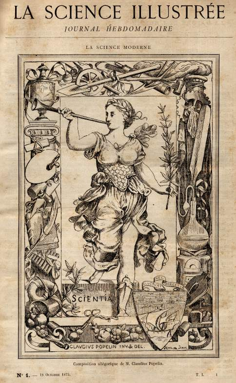 Composition allégorique de Claudius Popelin illustrant la première de couverture du numéro 1 de la revue "La Science Illustrée" publié en 1875